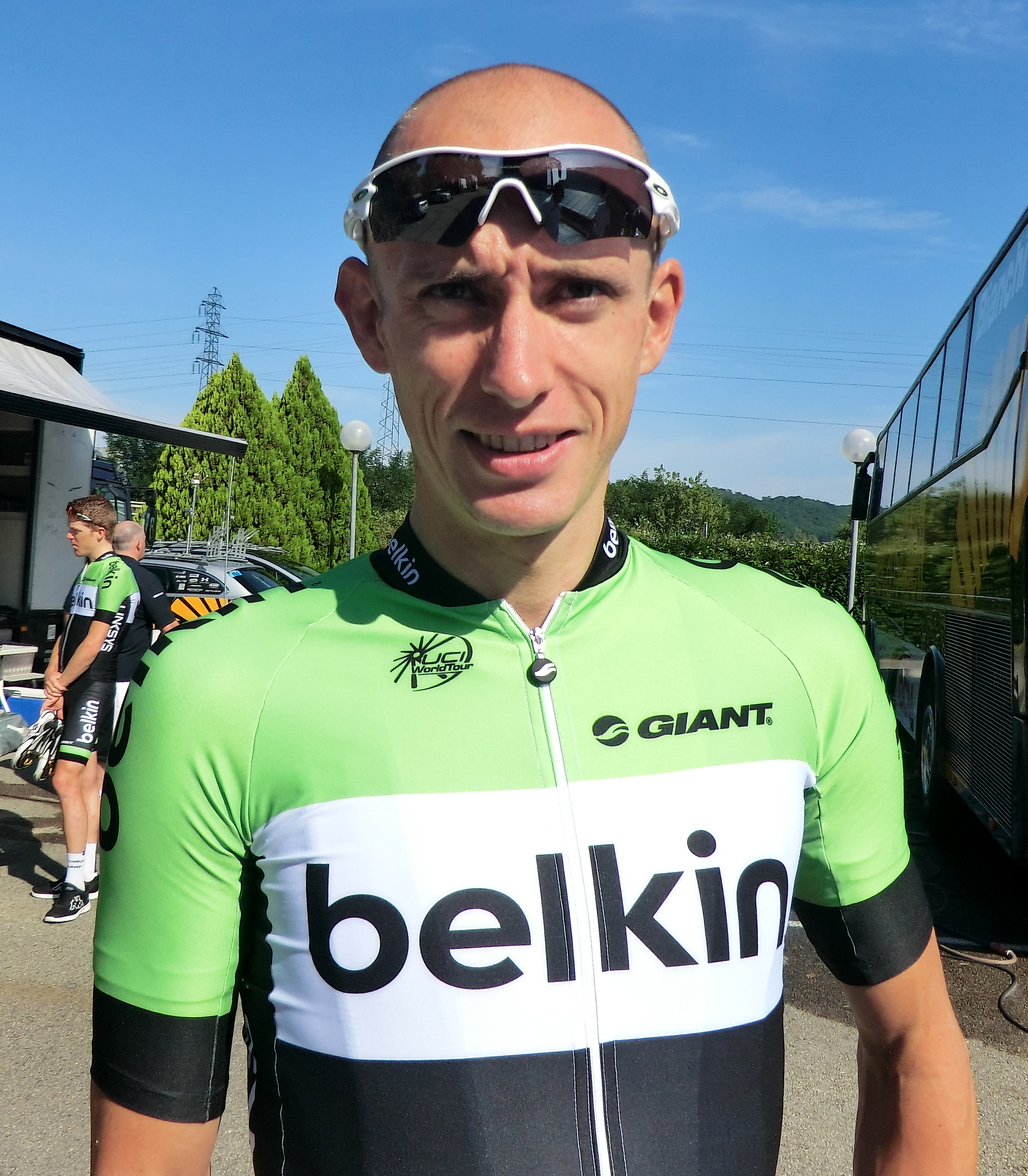 Coureurs à l'échauffement au matin du prologue du tour de l'Ain 2013, à l'hôtel Lyon-Est à Saint-Maurice-de-Beynost.